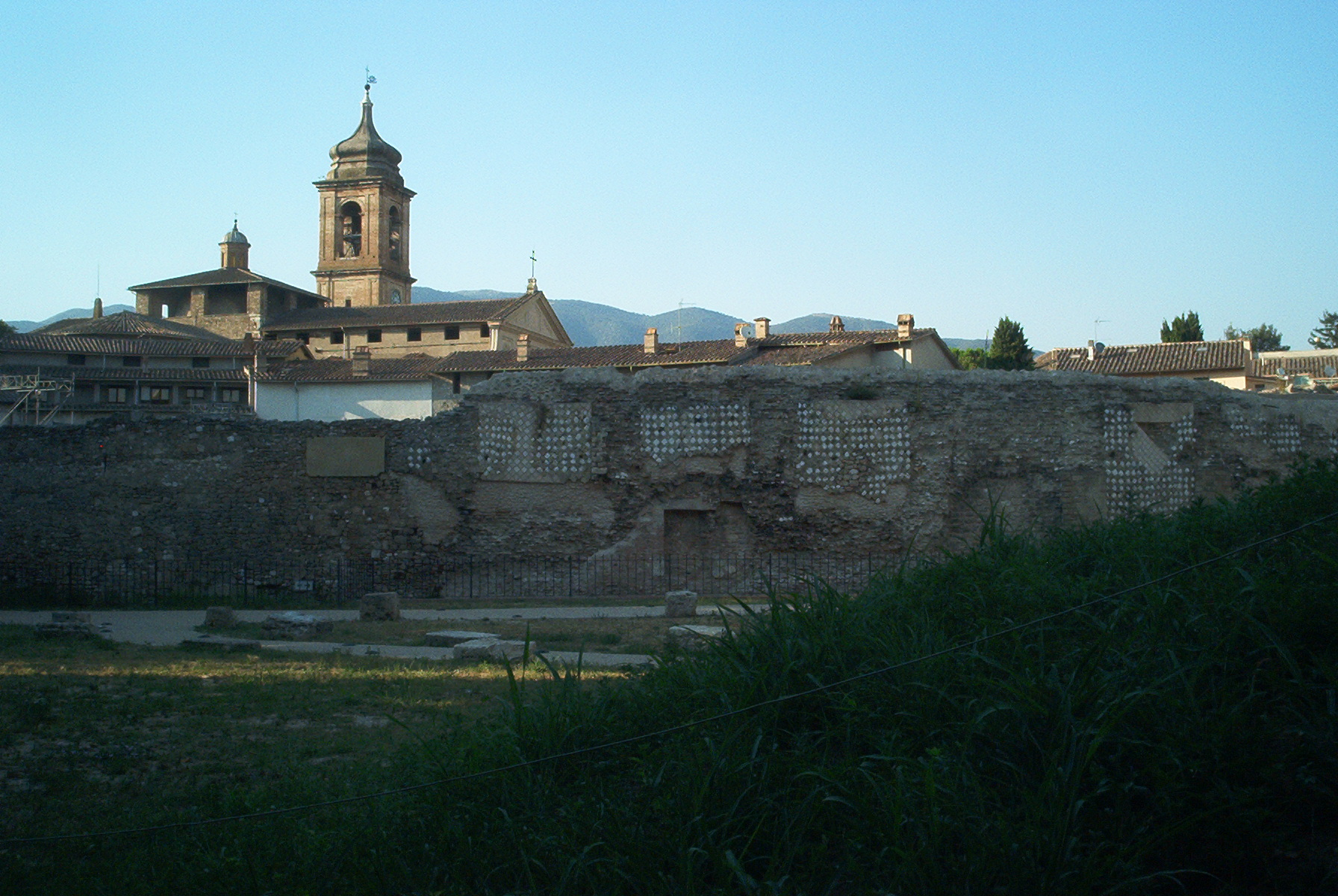 Anfiteatro Flavio, Terni.